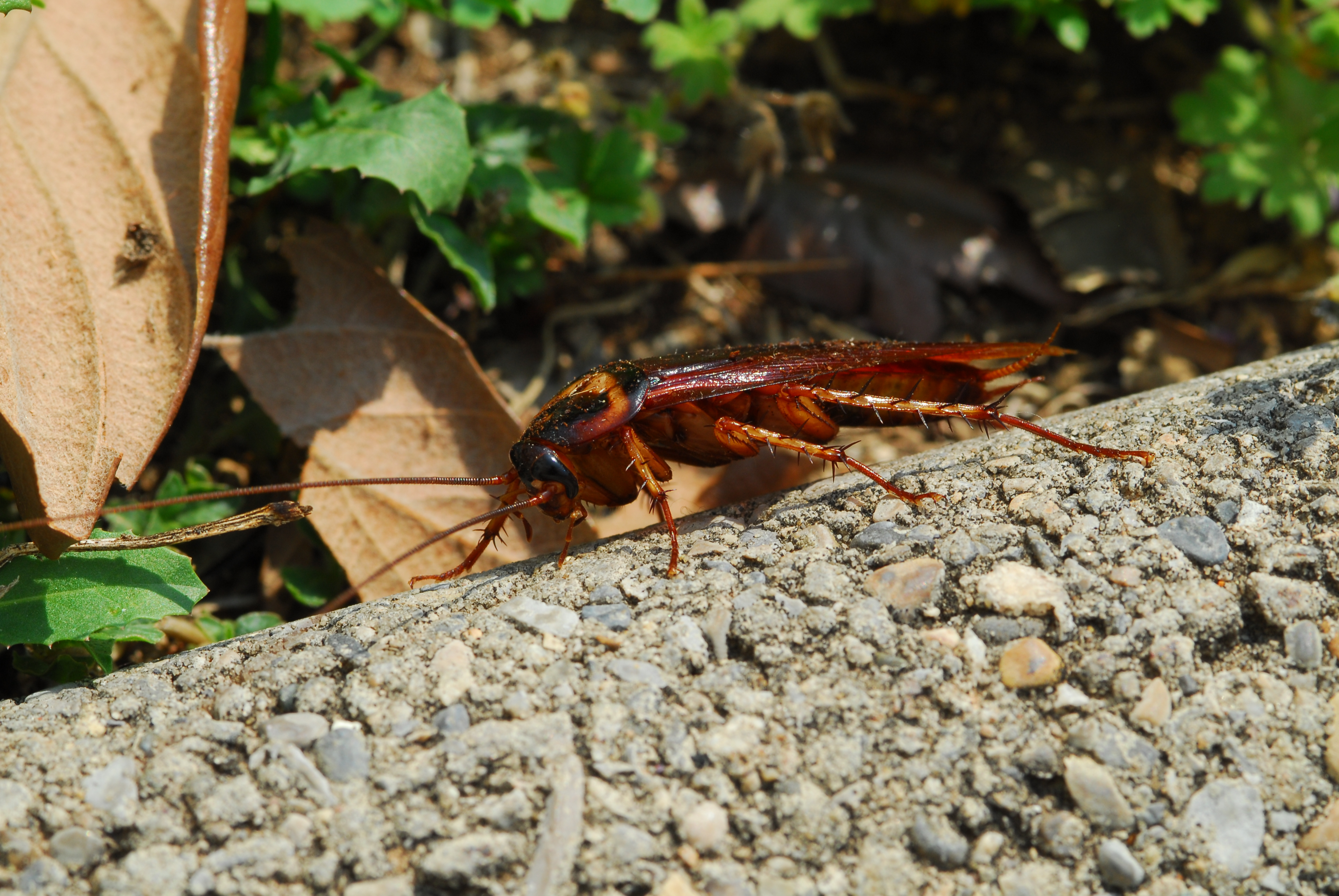 Periplaneta Americana, seen in Marseille, France